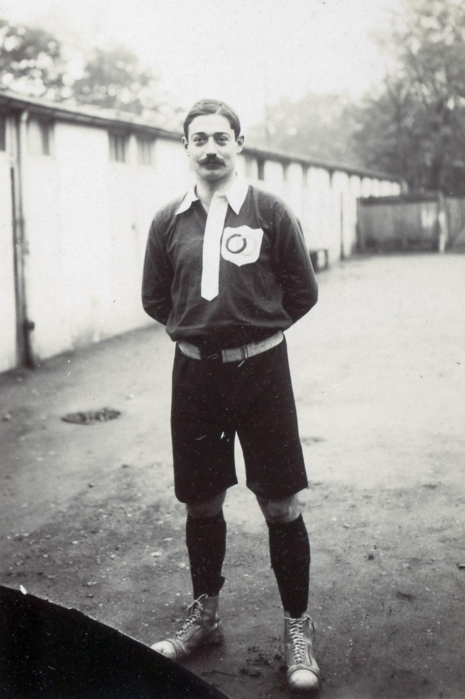 [Collection Jules Beau. Photographie sportive] : T. 32. Année 1906 / Jules Beau : F. 50. [Football Association, France contre Angleterre, Parc des Princes, organisé par l U. S. F. S. A. [Union des sociétés françaises de sports athlétiques], 1er novembre 1906] - Pierre Allemane.